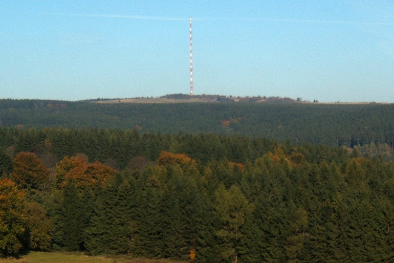 Der Heidelstein vom Hang der Hohen Hölle aus gesehen